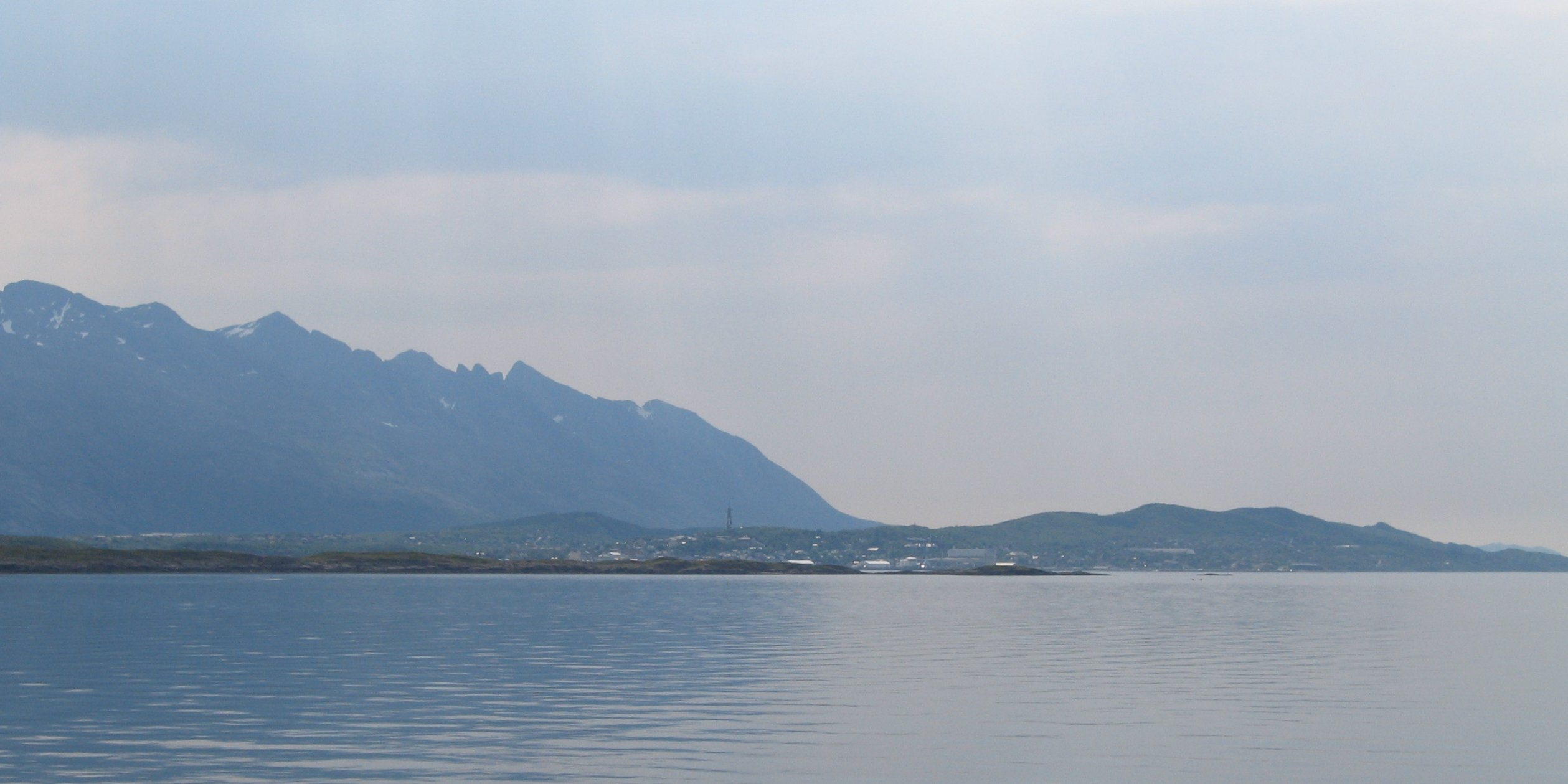 Sandnessjøen in Nordland, Norway. Picture taken from Løkvika in Leirfjord, Nordland by user:ZorroIII.